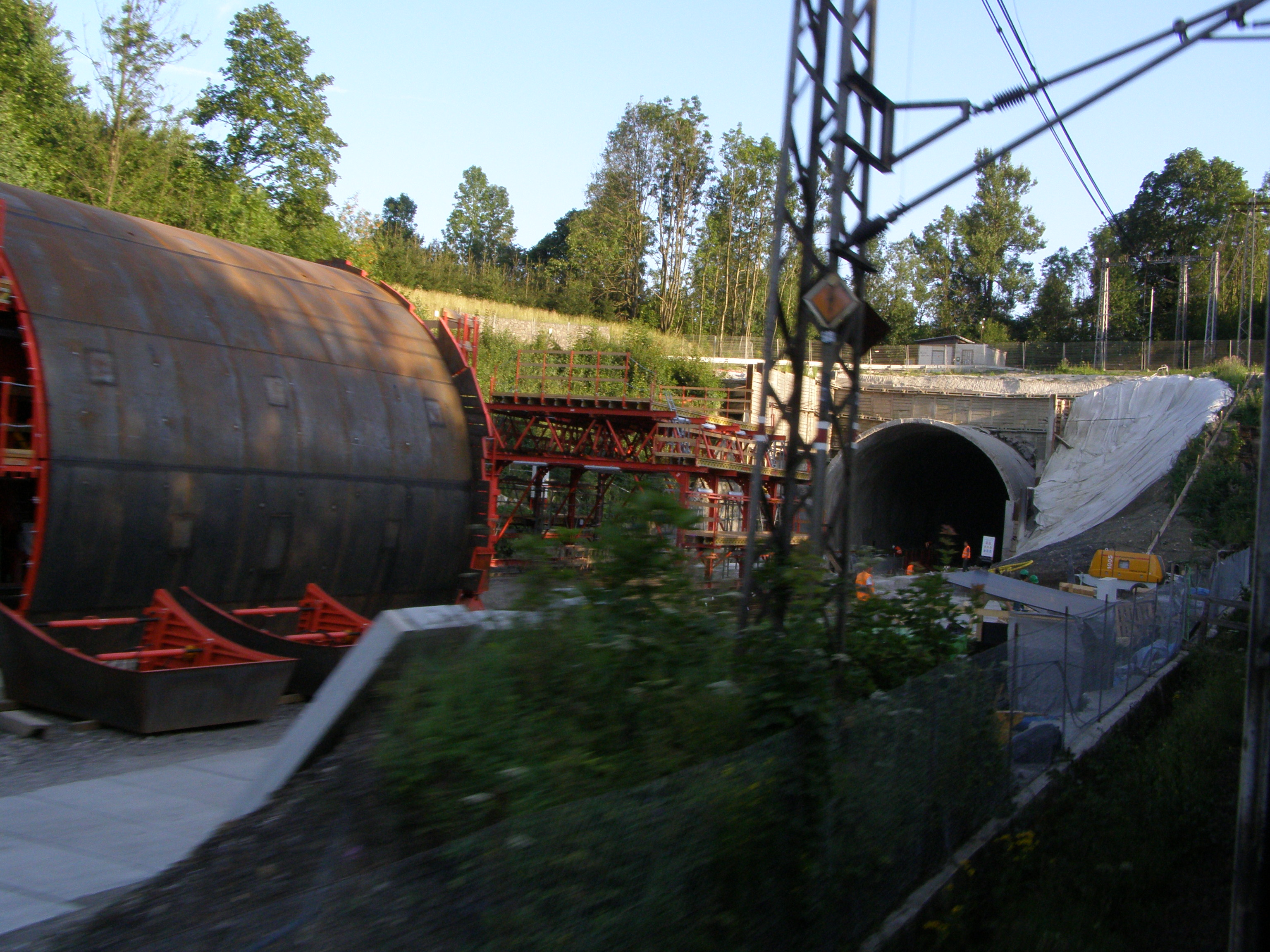 Železniční trať Bohumín - Čadca, stavba nového tunelu v Mostech u Jablunkova